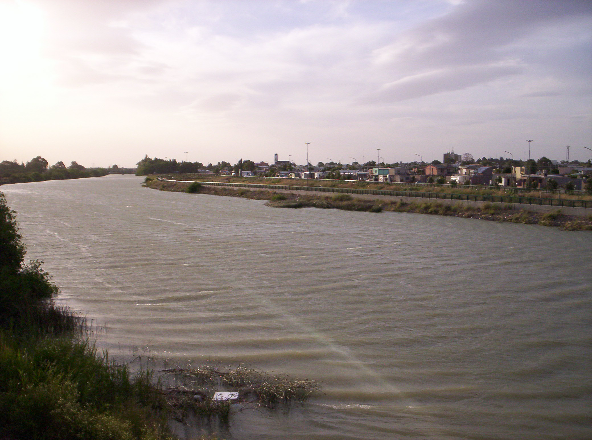 desde el rio la ciudad de rawson